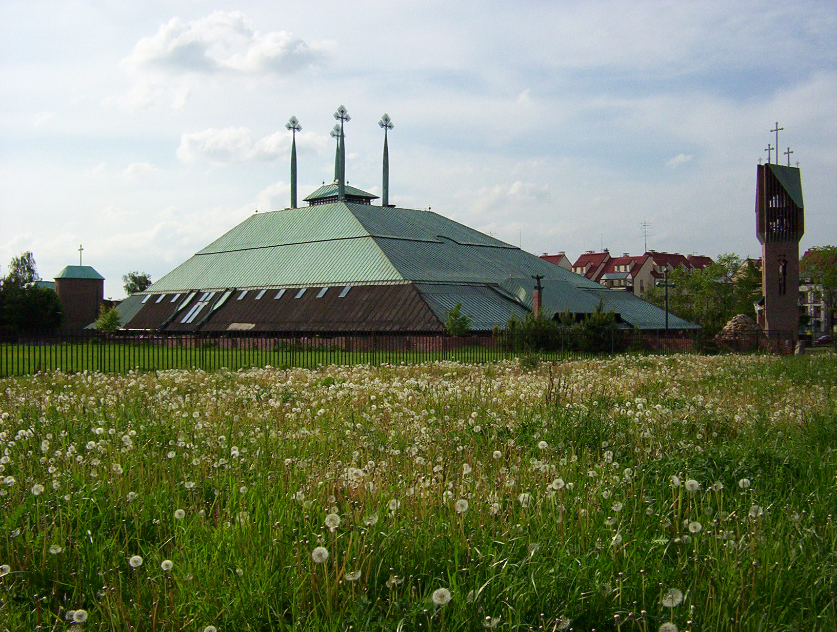 Koscioł Ducha Św. w Tychach